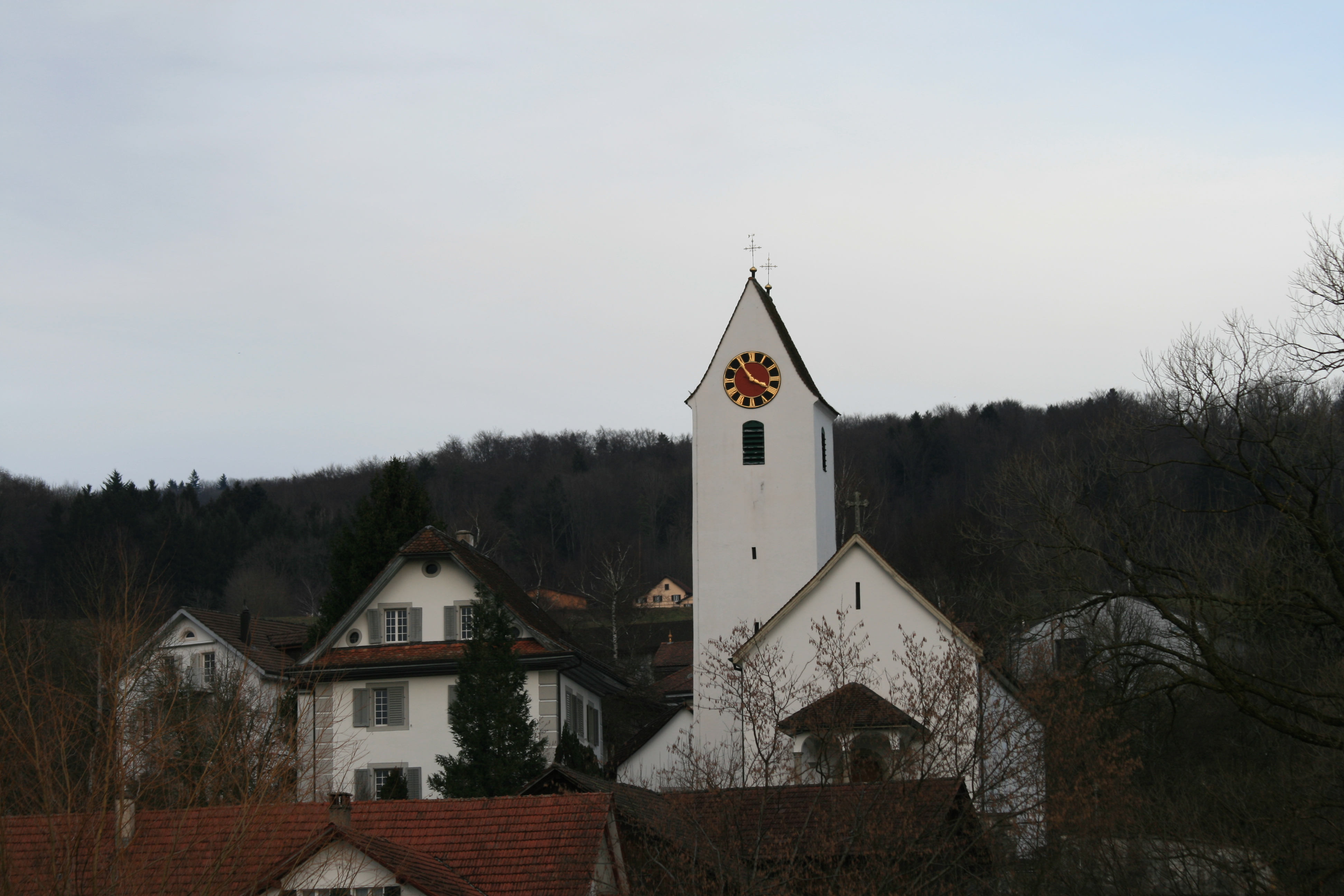 Kirche und Pfarrhaus Eggenwil